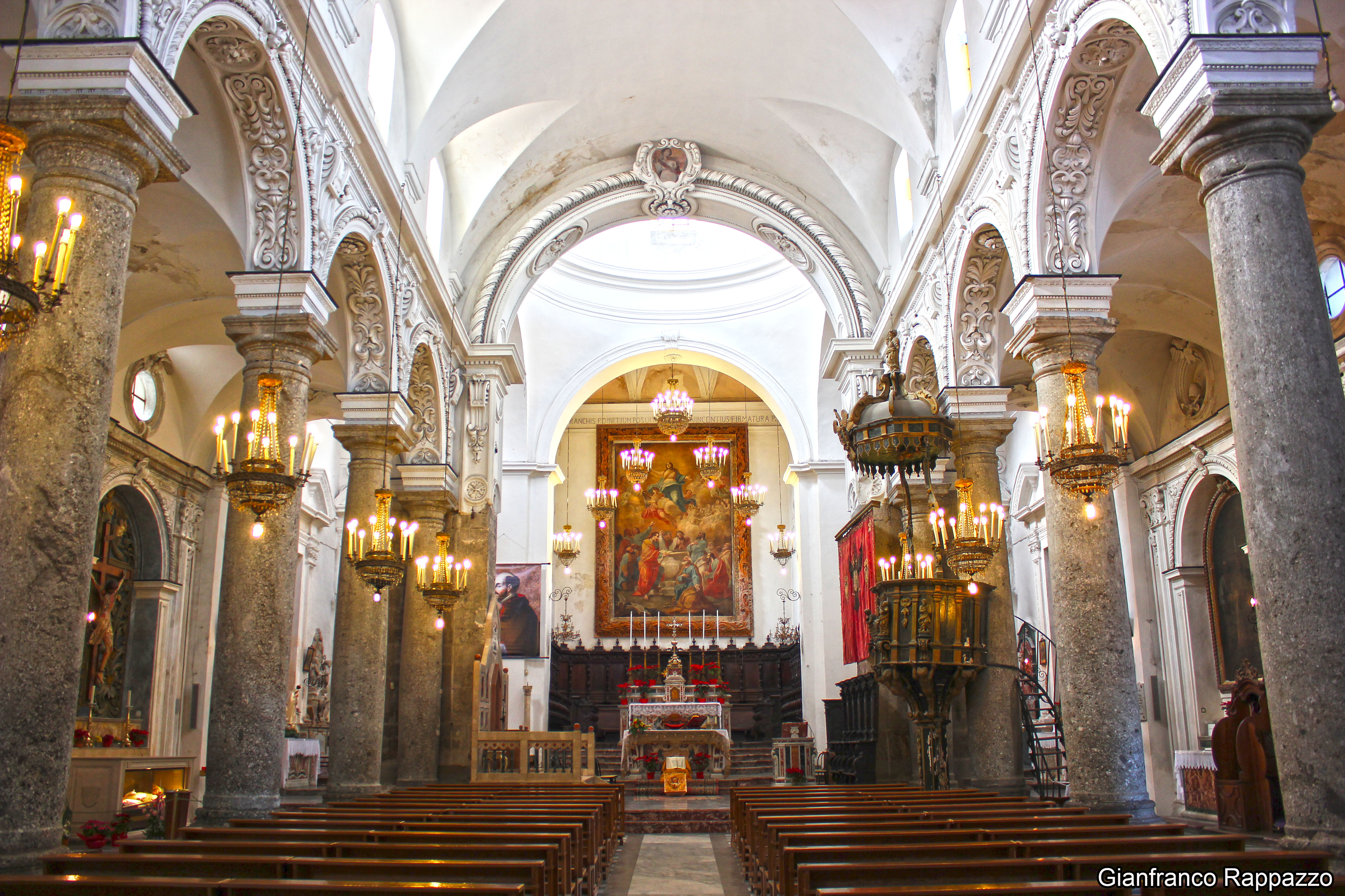 Intero Basilica Cattedrale, Santa Lucia del Mela